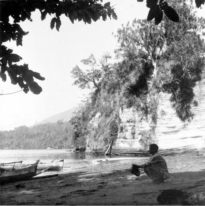 Repronegatief. Het 83-jarige hoofd van het dorp zit gehurkd bij de rotsen, die voornamelijk bestaan uit een goede kwaliteit tras, aan de kust van Poelau Lembeh, Celebes